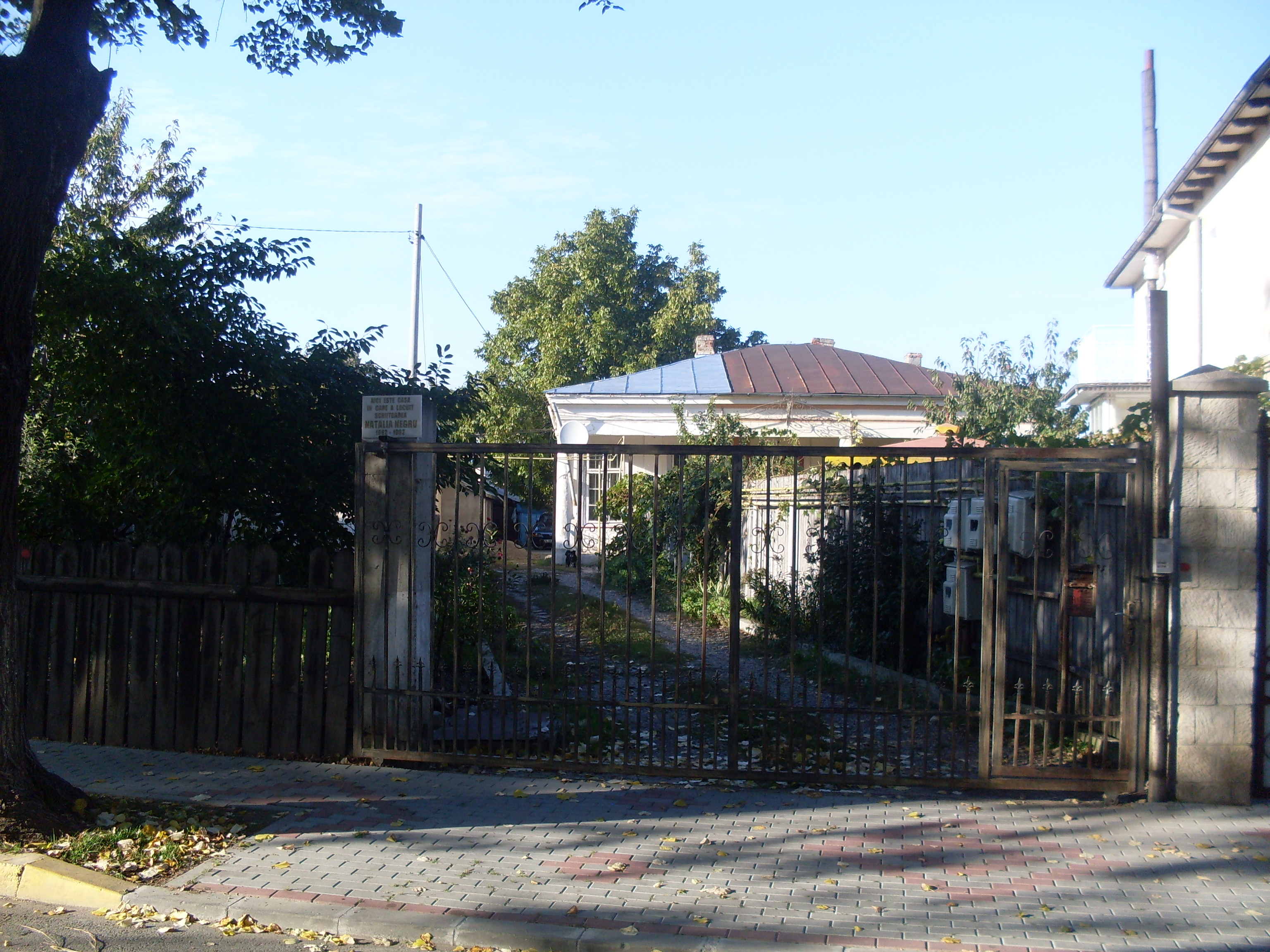 Casa Natalia Negru